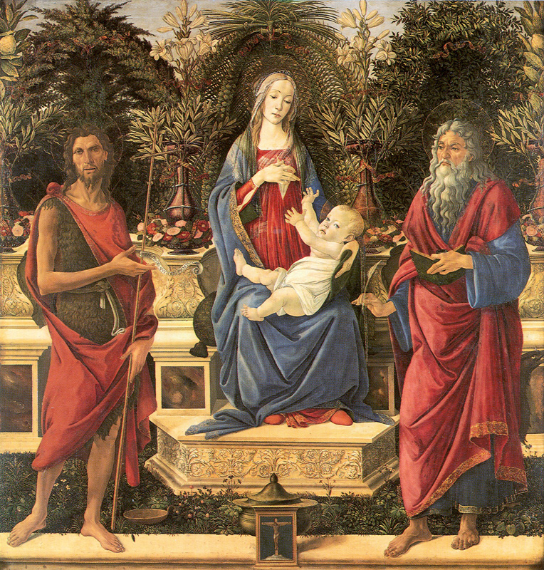 Maria auf dem Thron bereitet sich vor dem Jesuskind die Brust zu geben. Sie ist umgeben von den heiligen Johannes der Täufer, links, und Johannes dem Evangelisten, rechts, mit seinen traditionellen Attributen Buch und Feder.